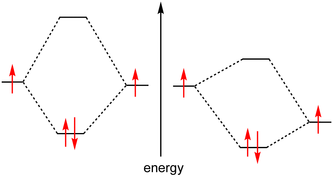 replacement MO scheme